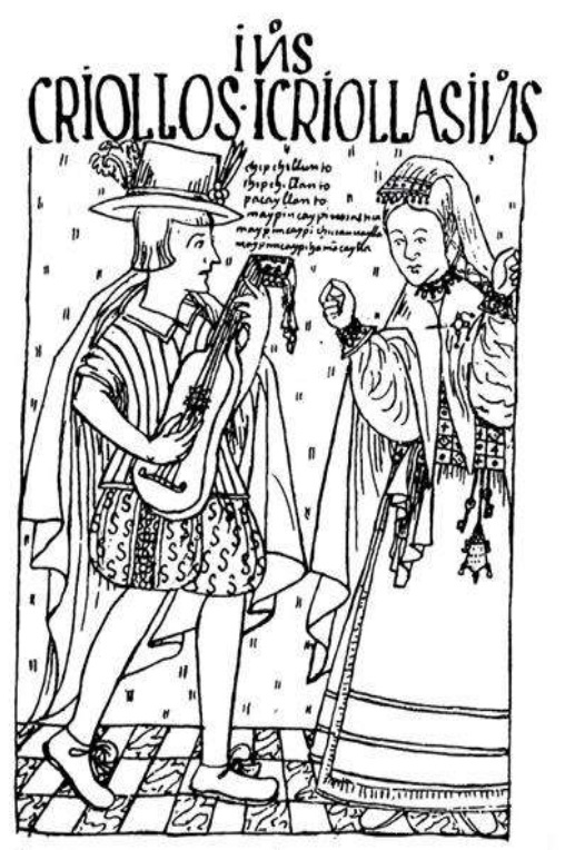 Los españoles y sus descendientes nacidos en América conformaban el alto grupo social en la colonia, Dibujo de la crónica Peruana de Huamán Pama de Ayala, siglo XVI.